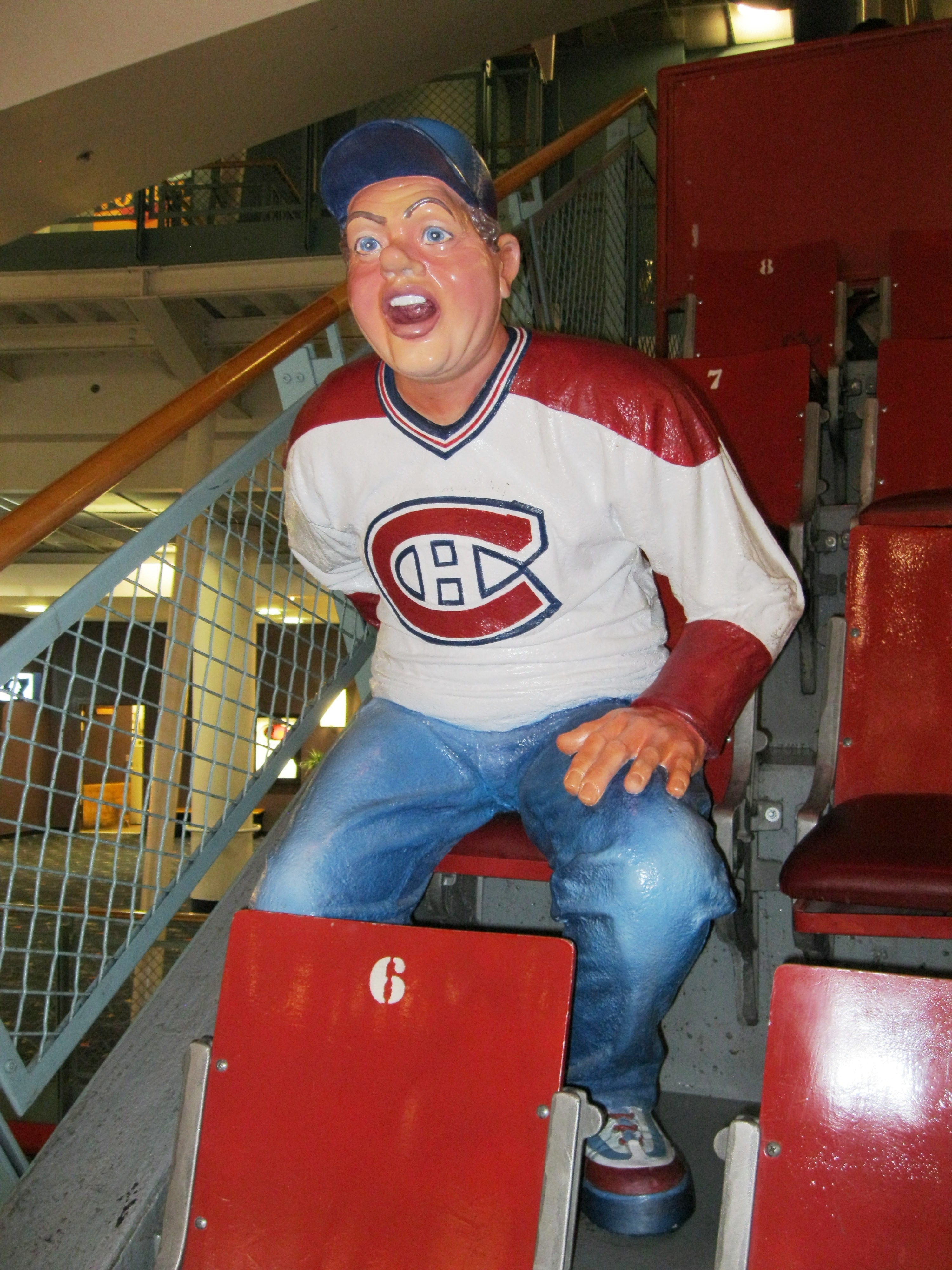 Fan de hockey